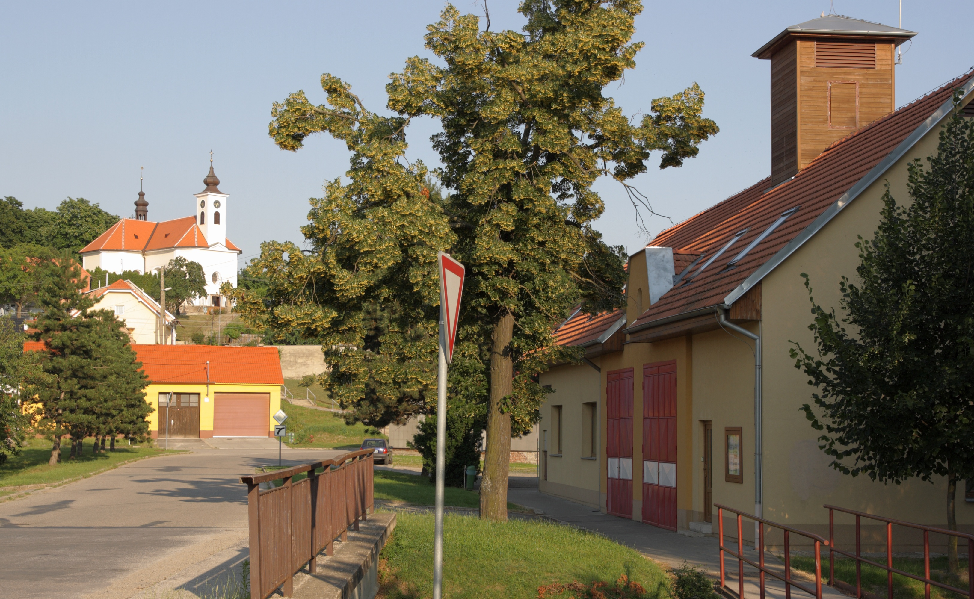 Syrovice - radnice a kostel.